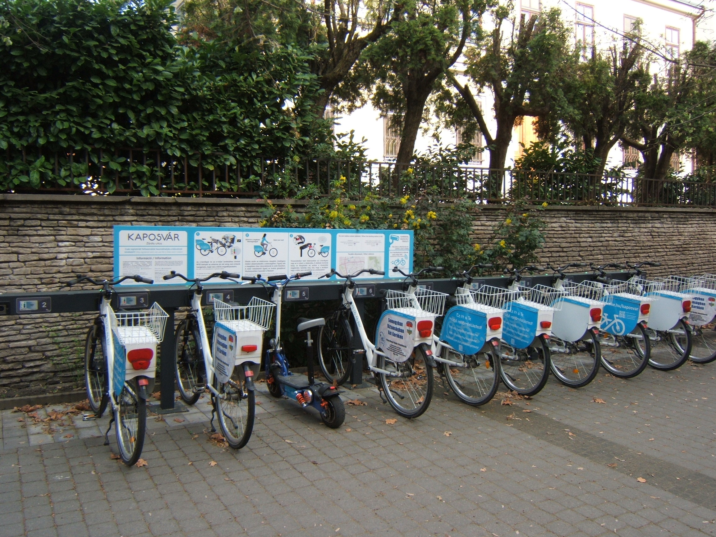 A Kaposvári Tekergő egyik állomása (Kossuth tér-Zárda utca)